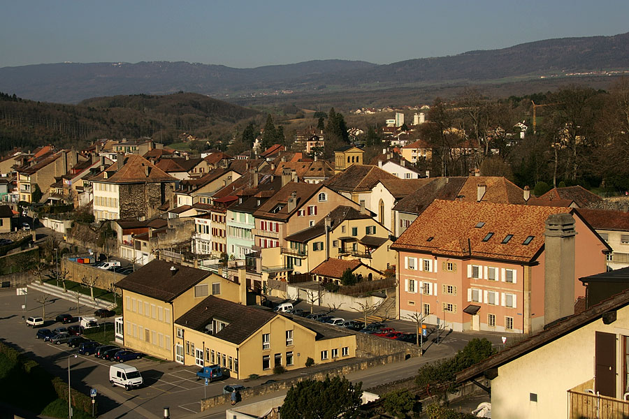 La Sarraz